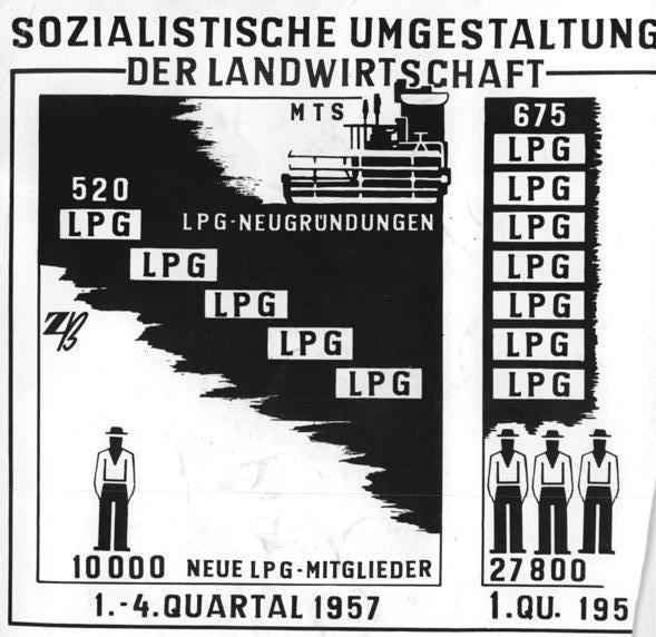 Infografik, Sozialistische Umgestaltung der Landwirtschaft Zentralbild Stolz-10.4.1958 Sozialistische Umgestaltung der Landwirtschaft-Die Genossenschaftsbewegung in der Landwirtschaft hat in diesem Jahr einen großen Aufschwung genommen. Im 1. Quartal 1958 bildeten sich 75 neue LPG und die Zahl der Mitglieder wuchs um 27 800. Das ist mehr als während des ganzen Jahres 1957 erreicht wurde. Im verflossenen Jahr sind 520 LPG neu gegründet worden und 10.000 neue Miglieder in die Genossenschaften aufgenommen worden.